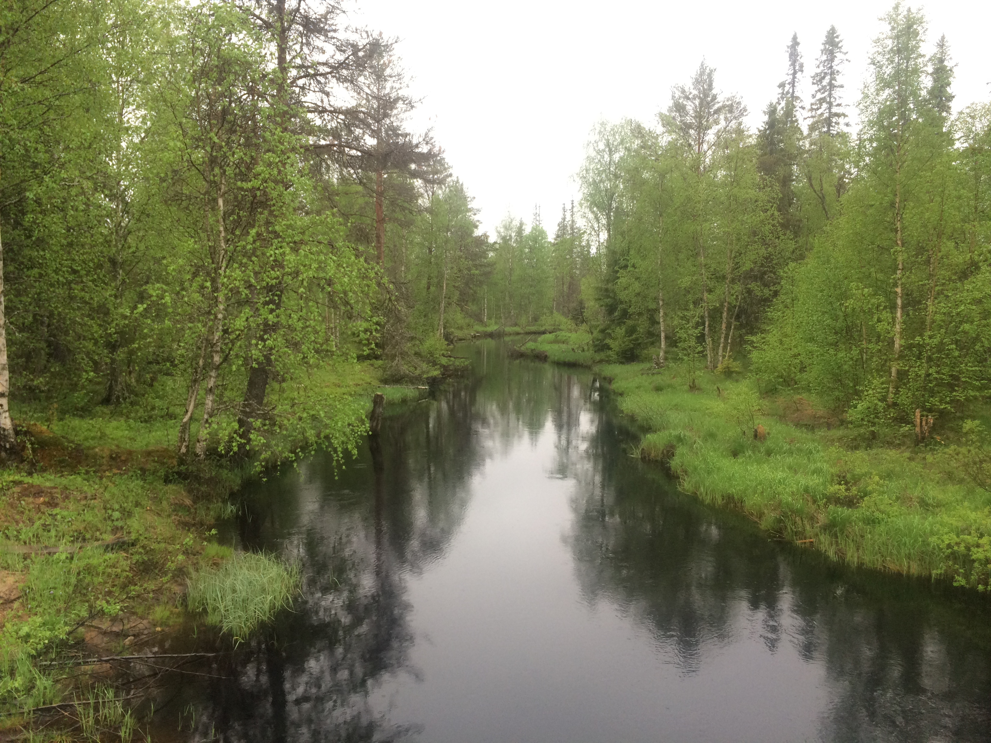 река Конди